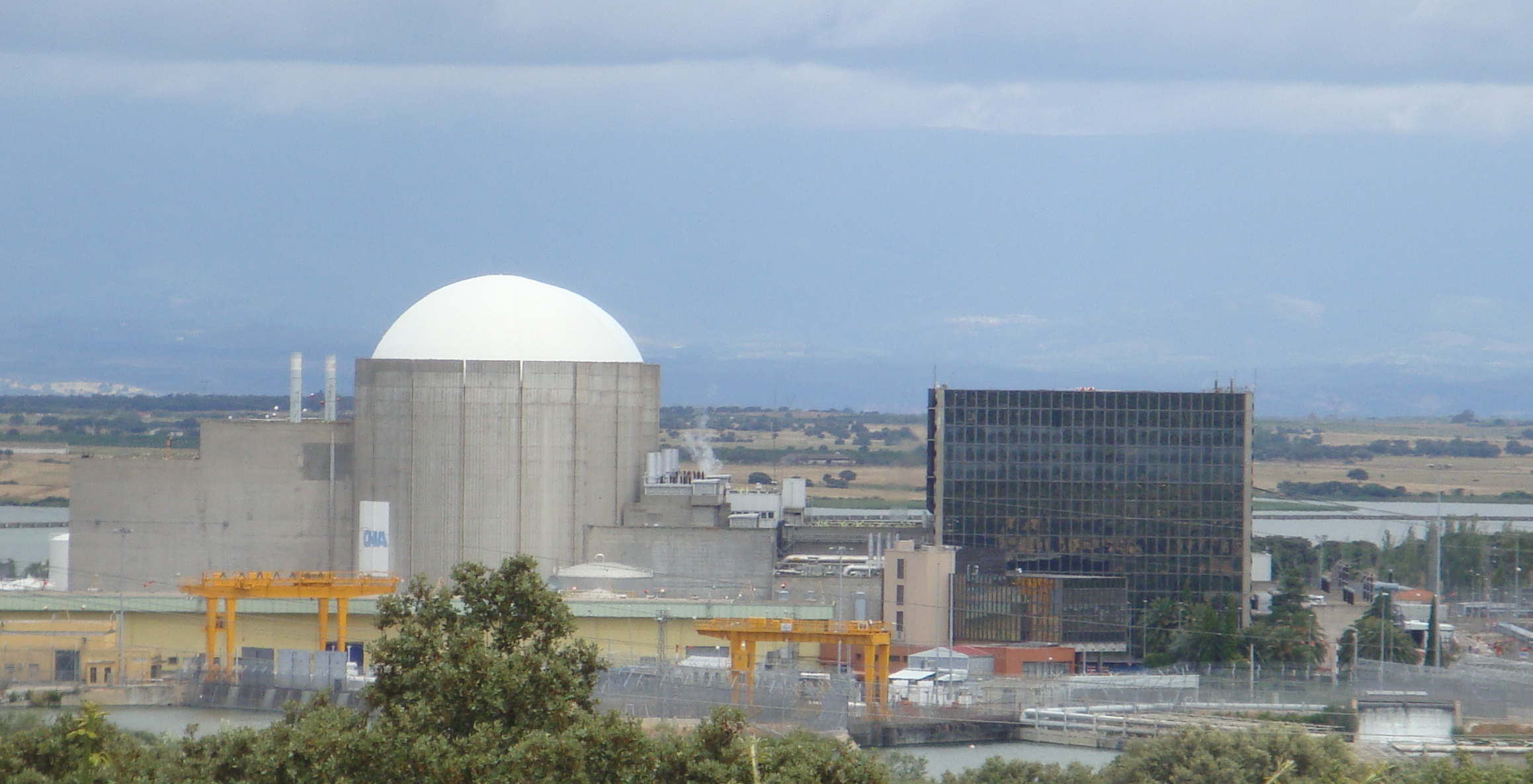 Central de energía nuclear Almaraz, (Cáceres) (España)